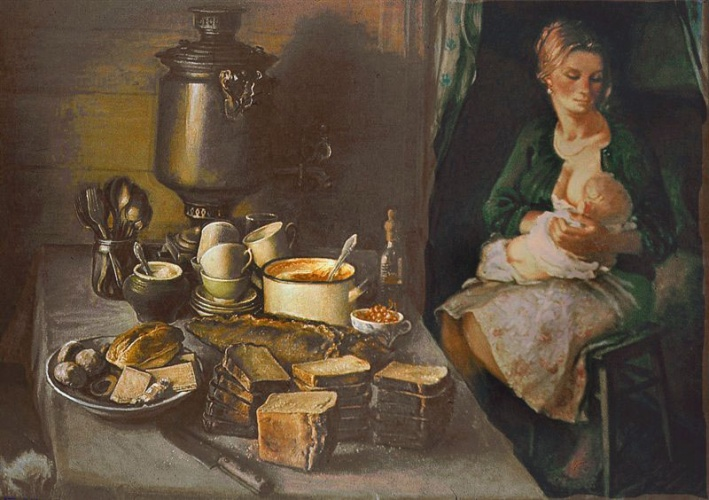 Doma. Samovar na stole.